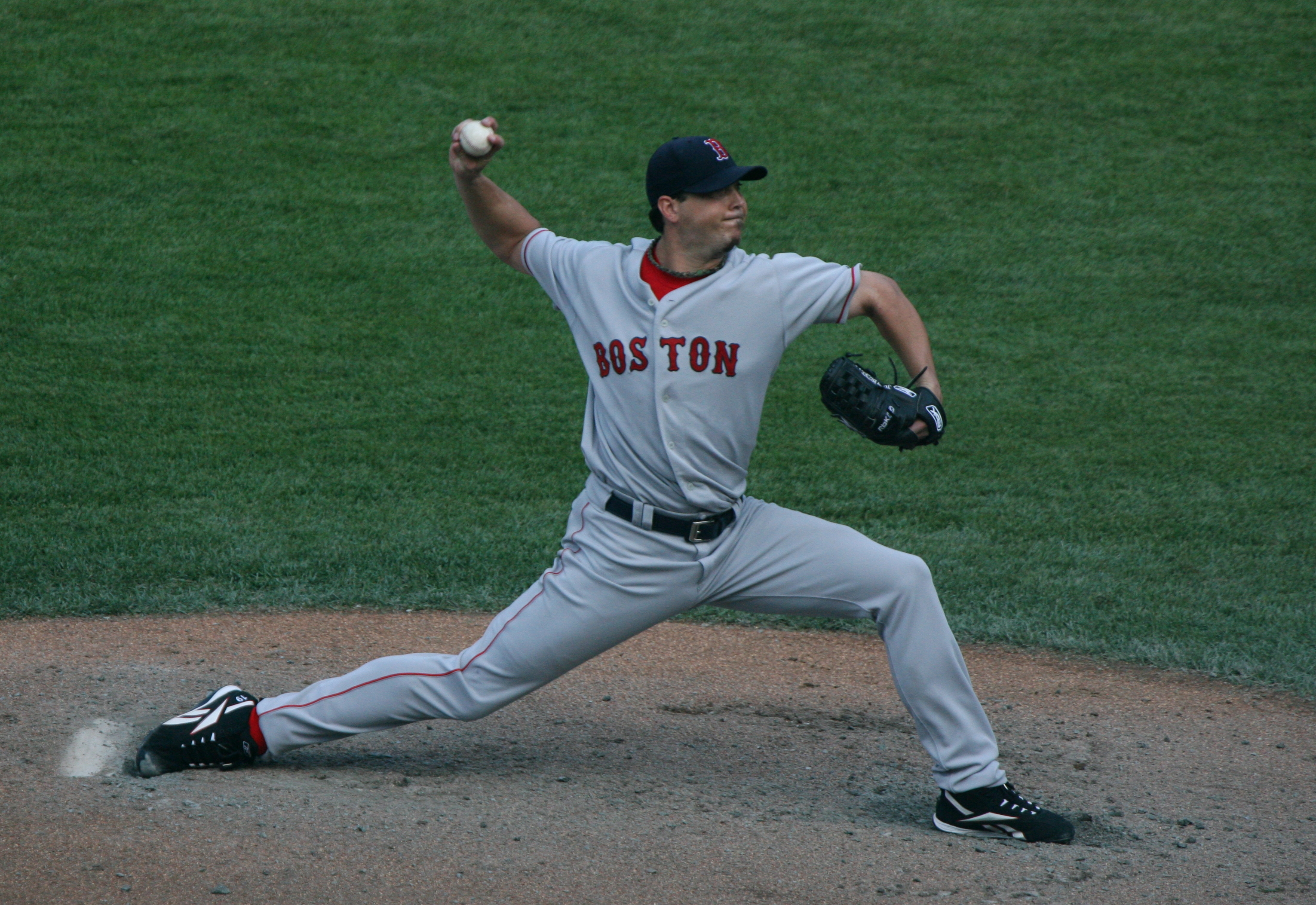 Josh Beckett